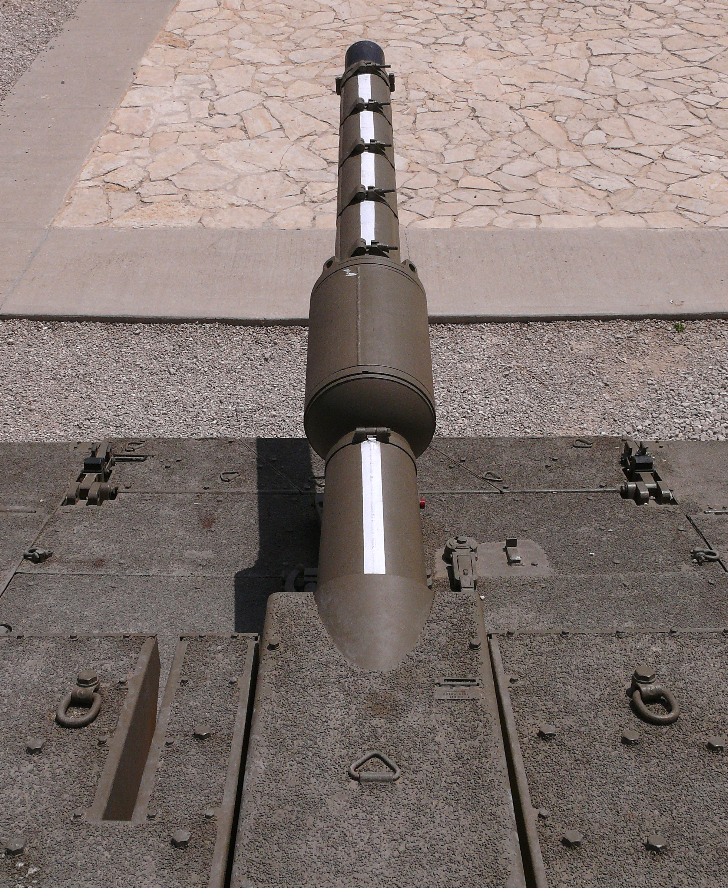 IMI MG253 tank gun on a Merkava tank Mk4 in Yad LaShirion, Latrun, Israel תותח תע"ש 120 מ"מ דור ב' על טנק מרכבה סימן 4 ביד לשריון, לטרון, ישראל